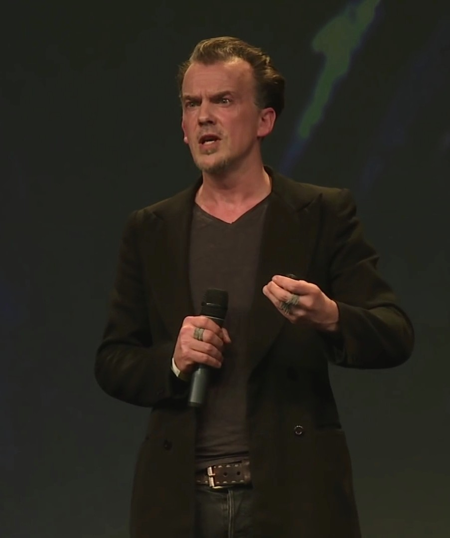 Find out more at: Das Goldige wird allzu schnell mit Kindlichem, Niedlichem und Süßem identifiziert. Das ist aber falsch. Tatsächlich steckt im Goldigen eine starke Bewegungsfigur, von der die Netzkultur angetrieben wird – an die allerdings noch einmal erinnert werden muss, um ihre eigentliche Kraft zu entfalten. Stephan Porombka Creative Commons Attribution-ShareAlike 3.0 Germany (CC BY-SA 3.0 DE)